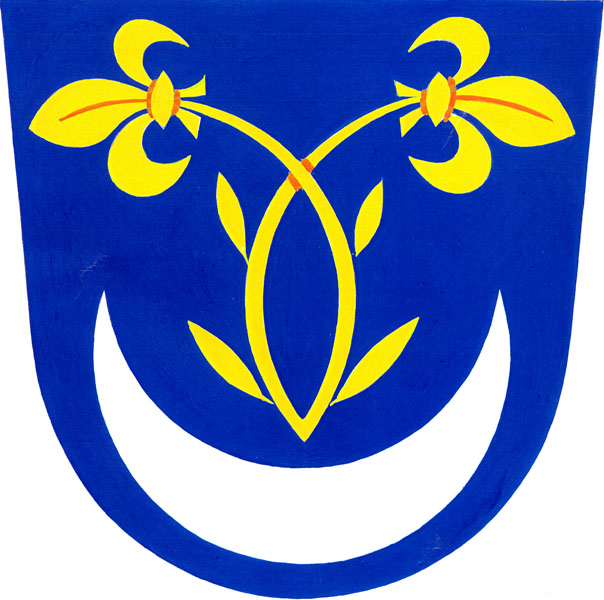 Znak obce Nítkovice